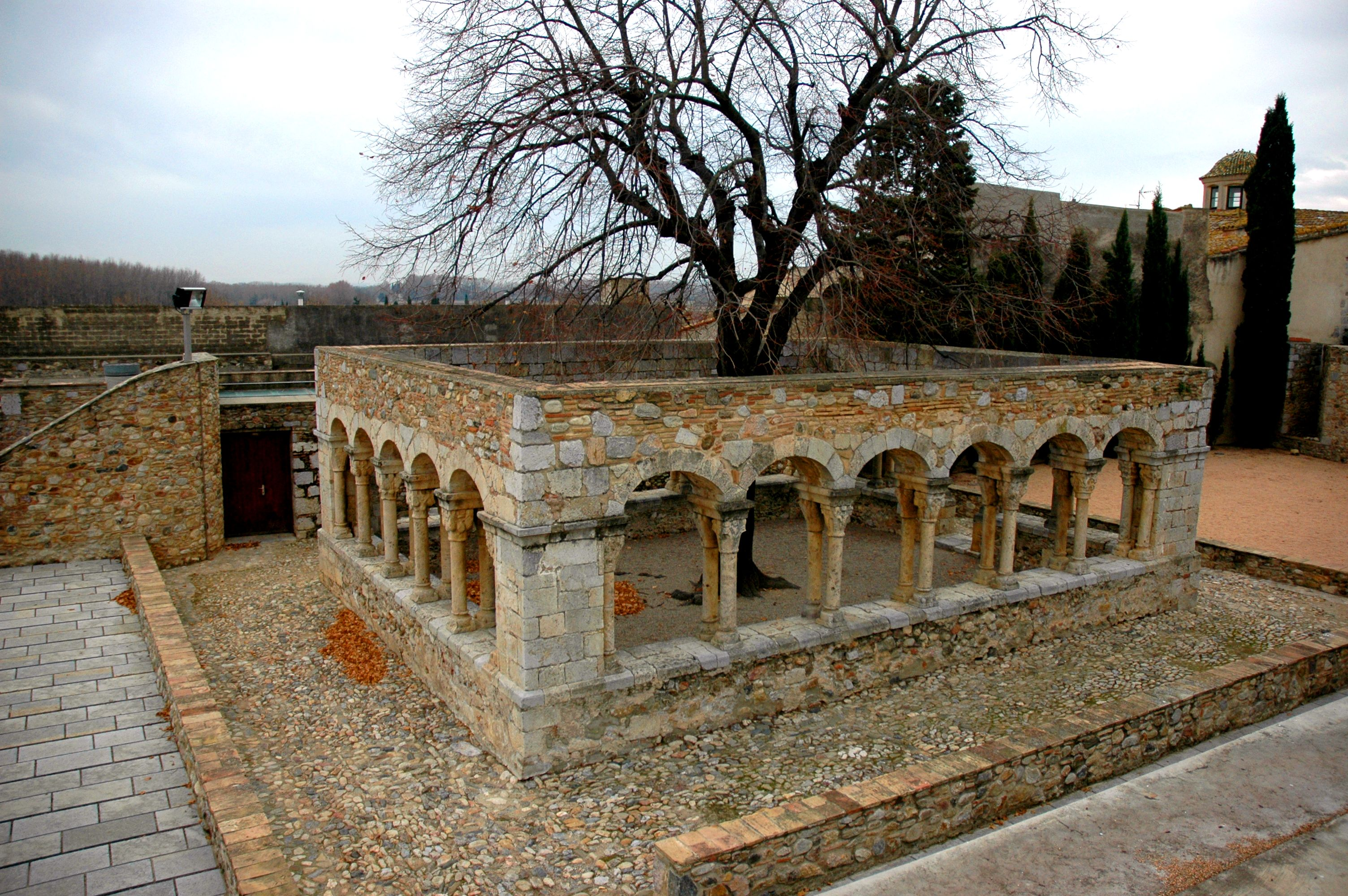 Peralada - Claustre Museu Sant Domènec